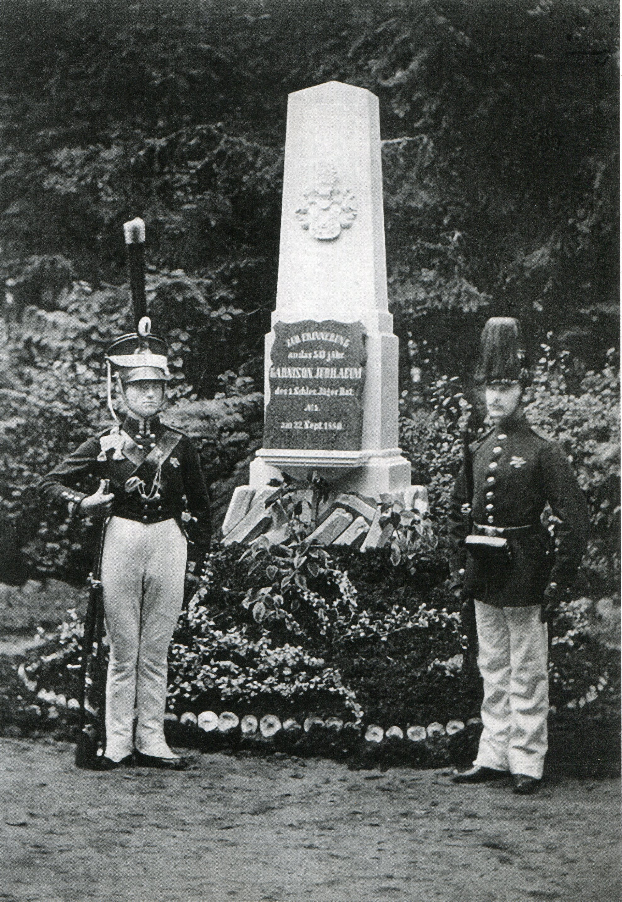 Denkmal zum Anlass 50. Garnisonsjubiläums 1880 im Jägerwäldchen von Görlitz